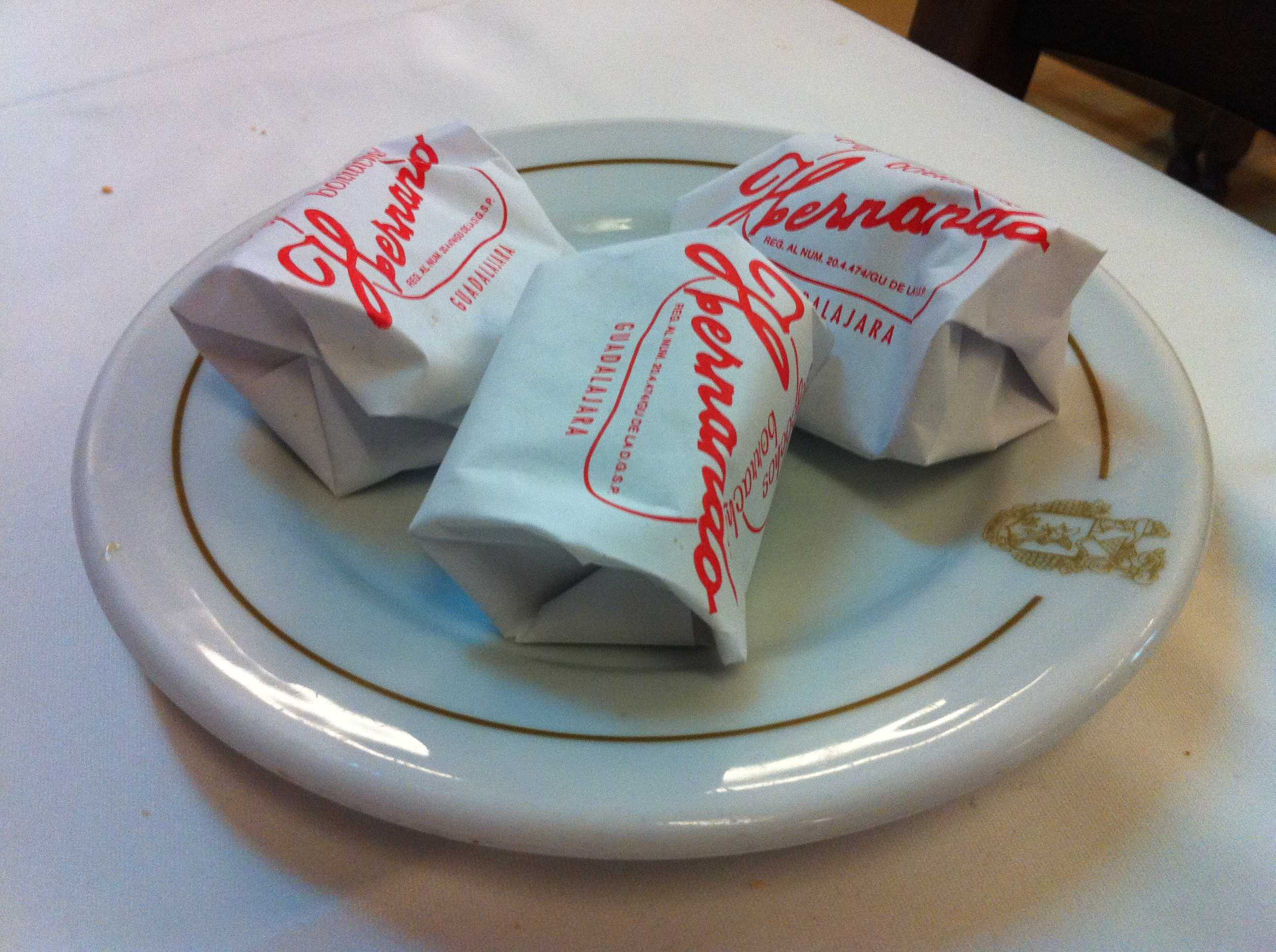 Borrachos de Guadalajara (Casa Hernando)